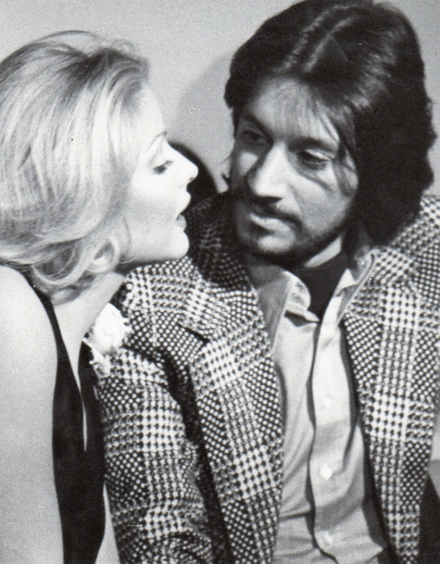 Giovanni Petrucci e Ewa Aulin in una scena del film QUANDO L'AMORE E' SENSUALITA'